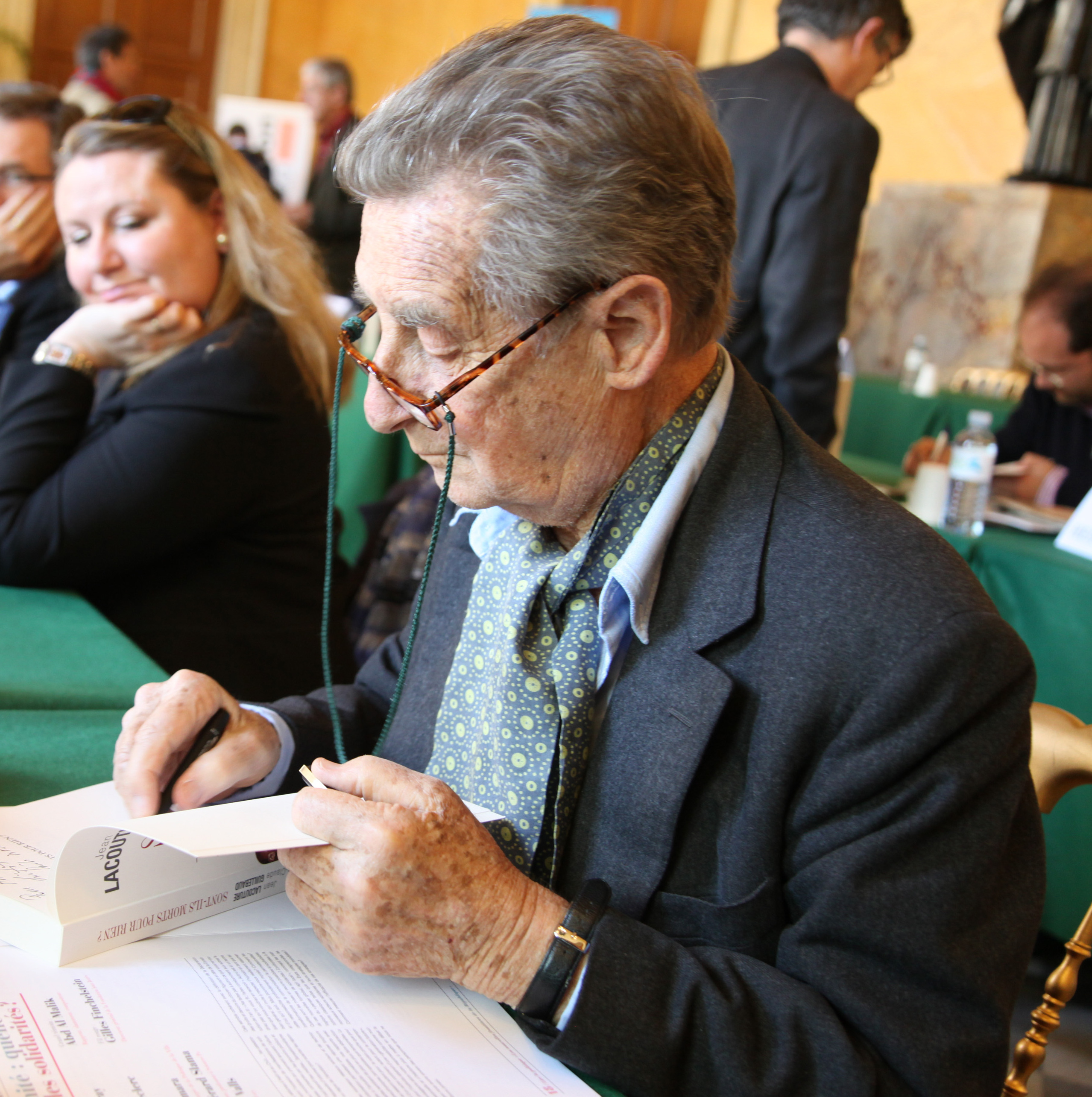 Jean Lacouture le 10 avril 2010 lors de la 19e Journée du livre politique organisée par l'Assemblée nationale.